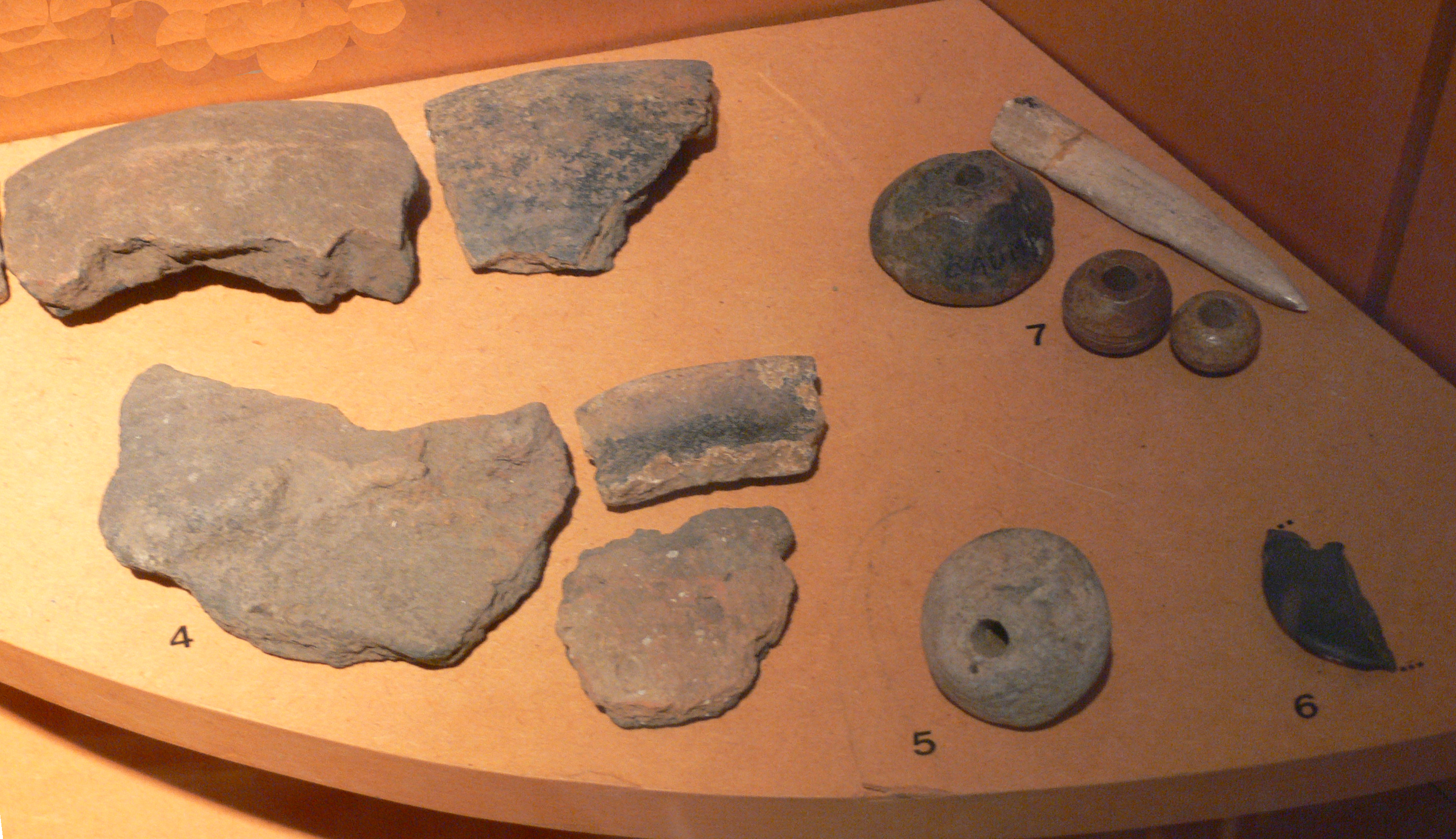 Fragments de céramique décorée (4), fusaïole biconique en terre cuite (5), pendeloque en roche polie (6), fusaïoles, perles, poinçons (7) issus des fouilles de la grotte de la Baume (Echenoz-la-Méline, Haute-Saône). Vesoul, musée Georges-Garret.